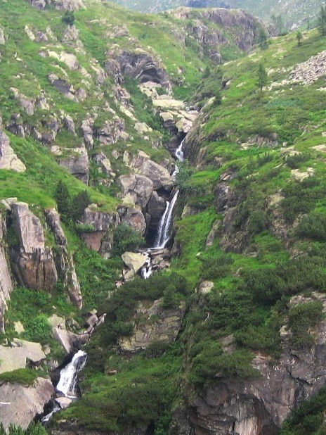 Cascate del Rio Venerocolino, Valle di Scalve (BG)